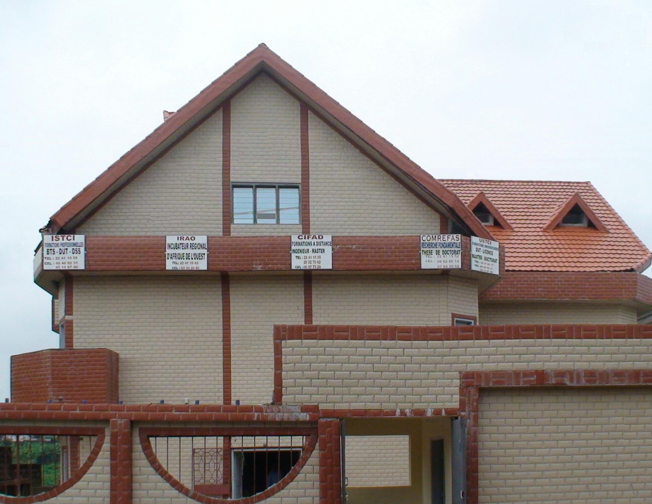 Siège du Consortium pour le Management de la Recherche Fondamentale et Appliquée en Afrique au sud du Sahara (COMREFAS) dans le quartier Cocody 2 Plateaux à Abidjan (RCI).